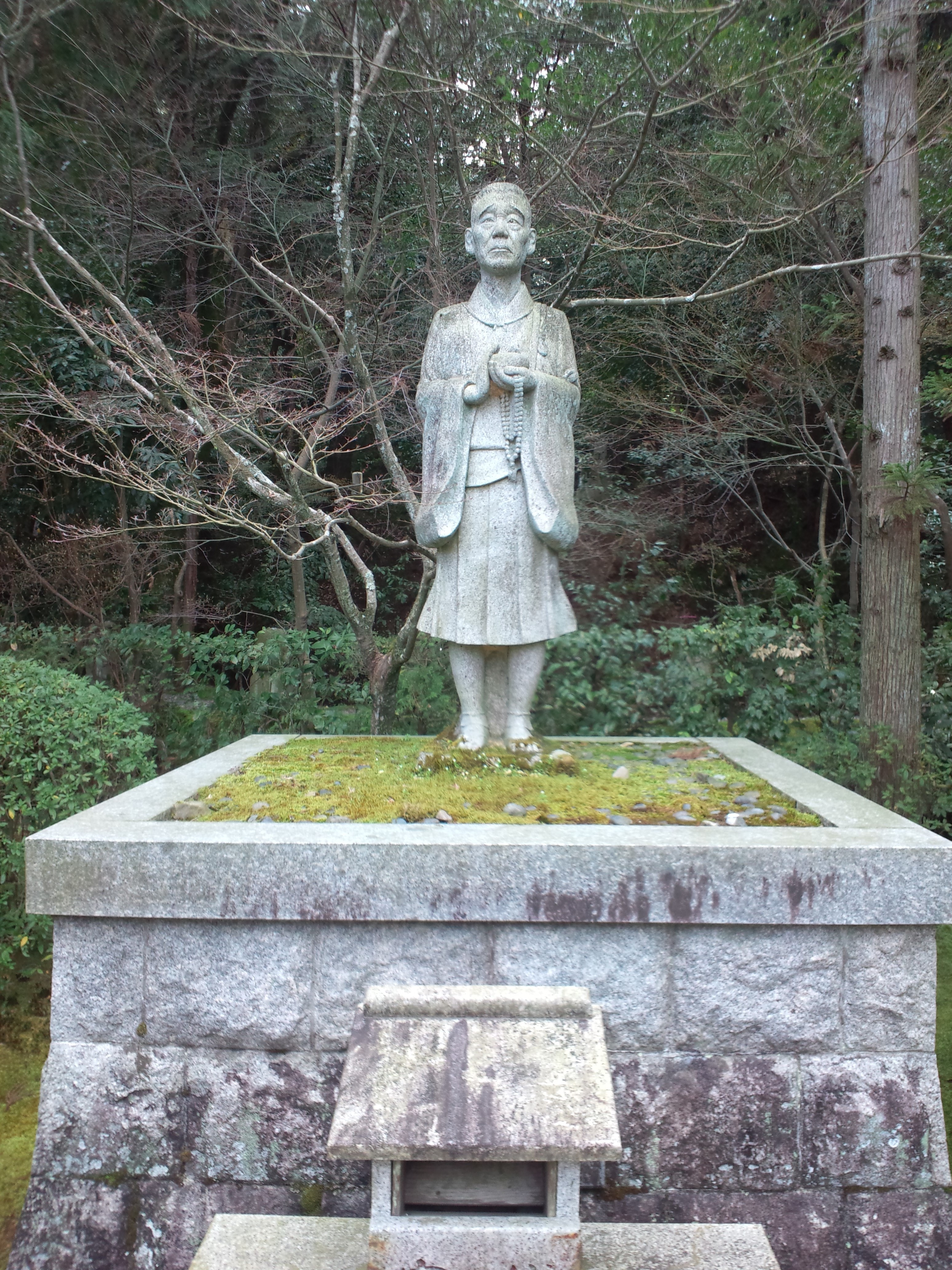 一休寺 一休像